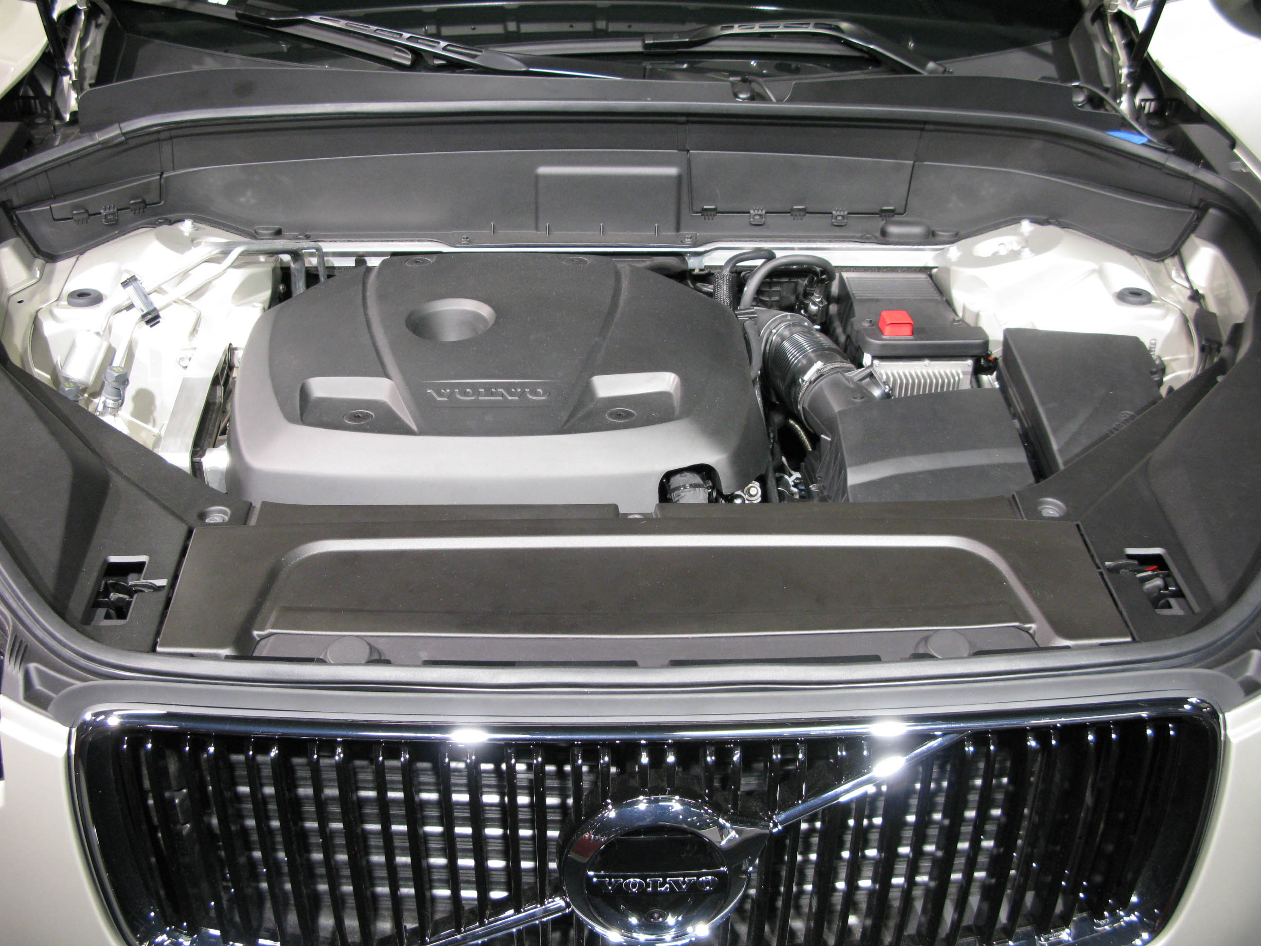 Volvo XC90 T6 AWD